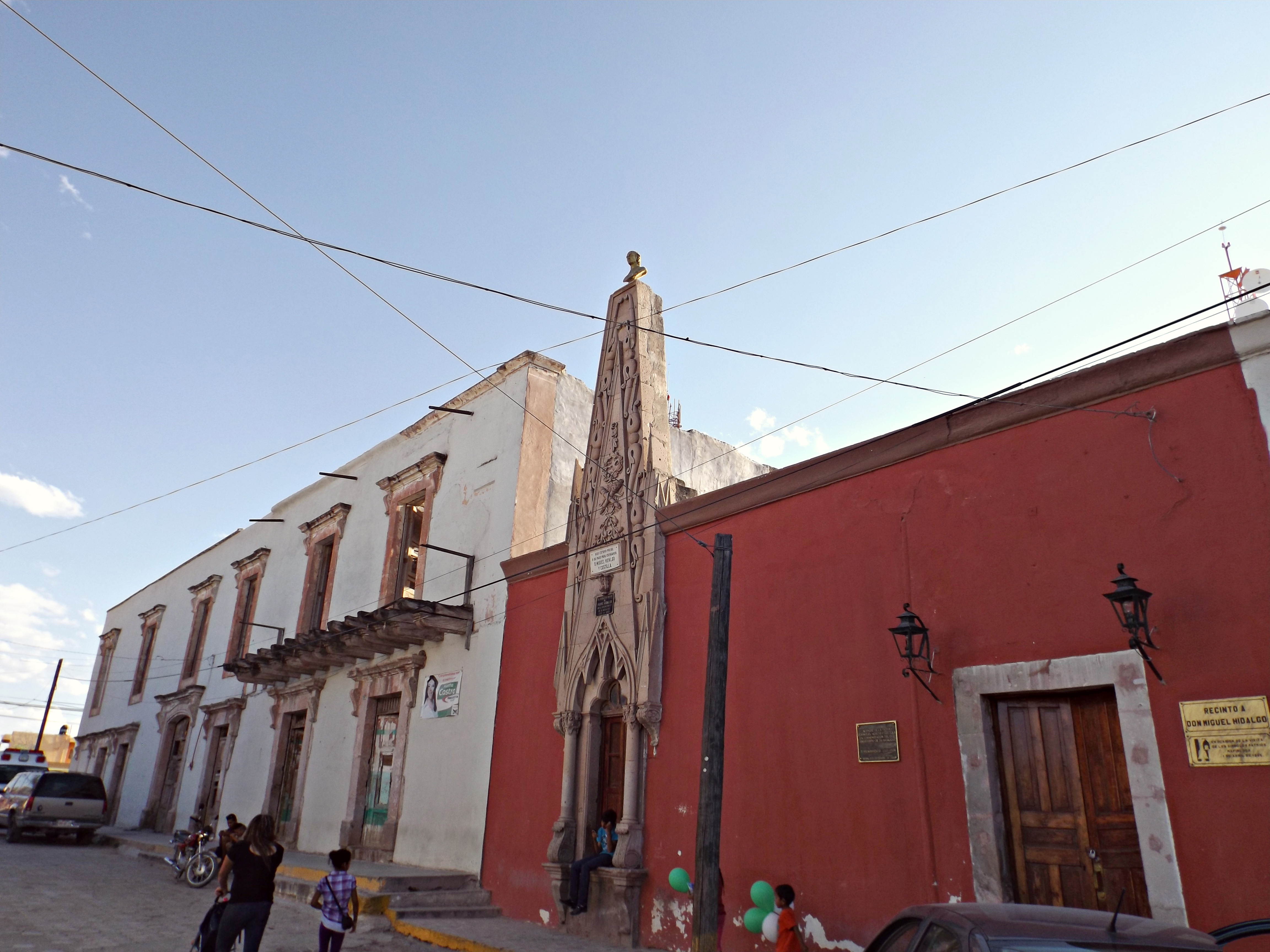 prisión donde fue encarcelado hidalgo en su captura 1811